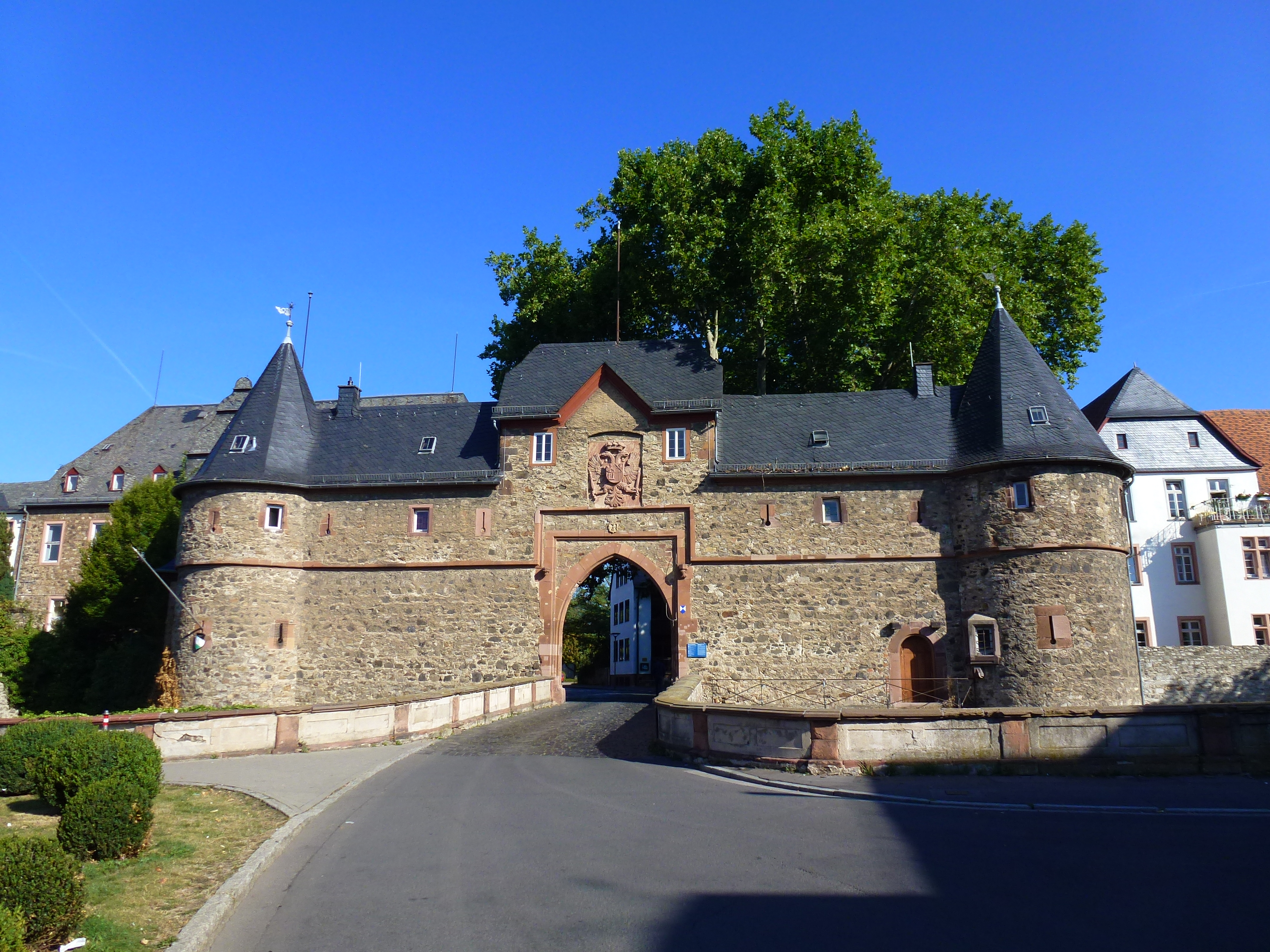 Haupttor der Burg Friedberg (Hessen)